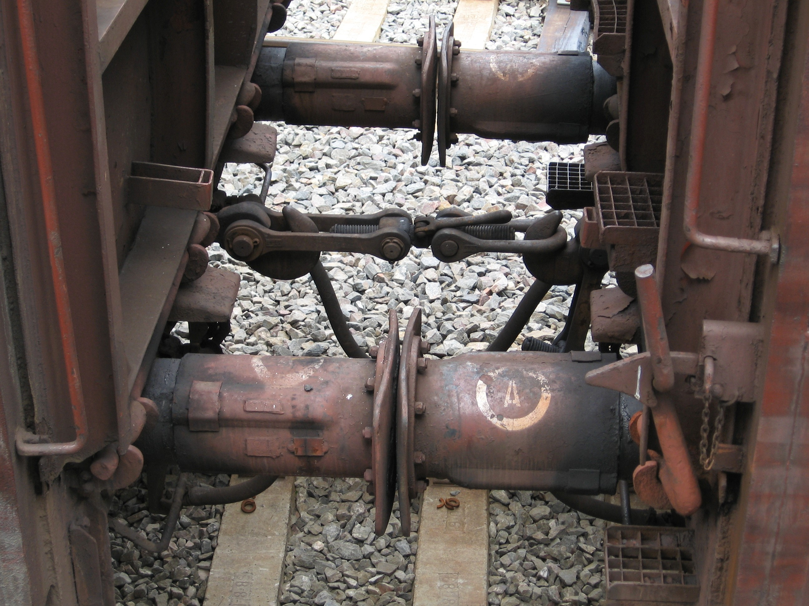 Spojení dvou nákladních vagonů